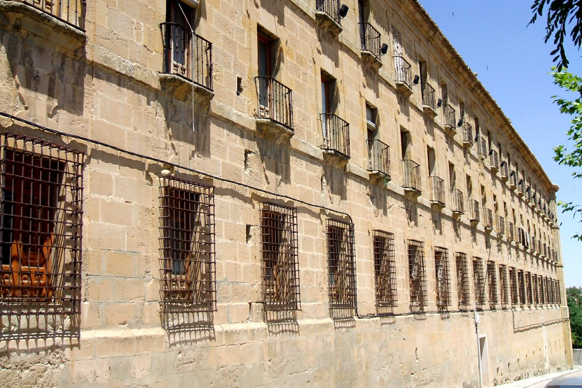 Huete - Monasterio de Santa Maria de la Merced